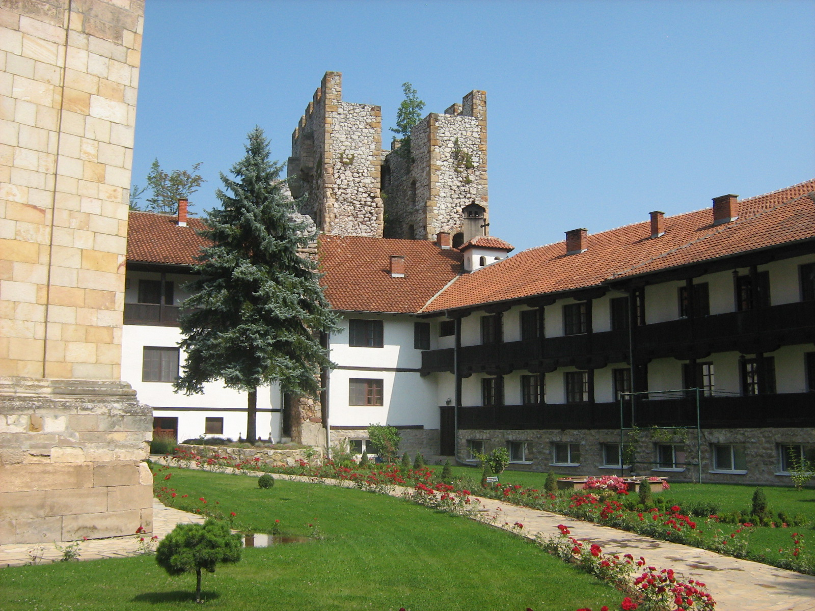 Манастир Манасија